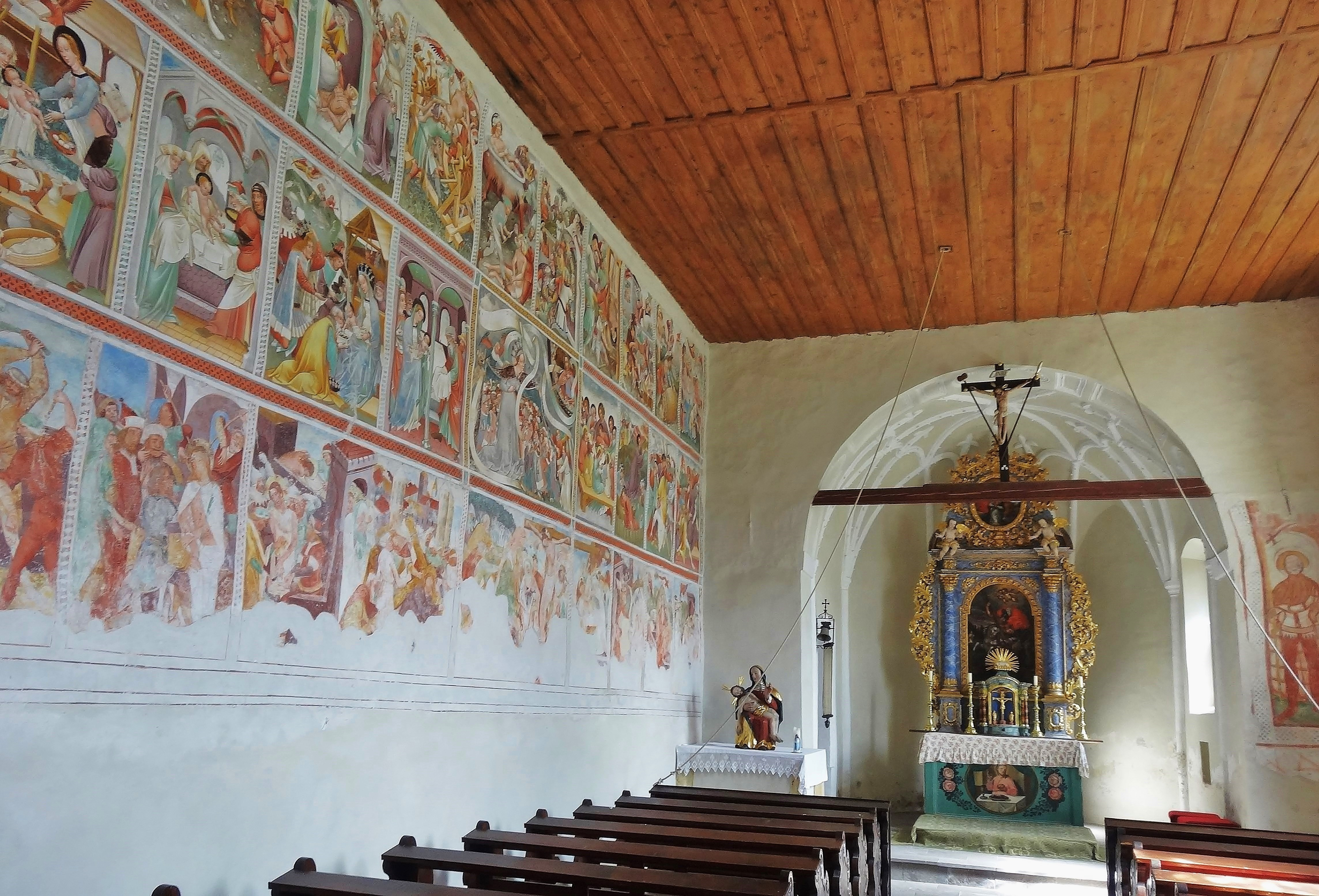 Kath. Filialkirche Hl. Georg in Gerlamoos (Steinfeld), Innenansicht